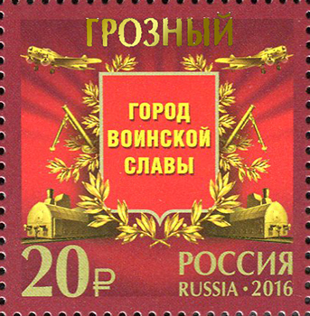 Почтовая марка России (2016). Грозный-город воинской славы.